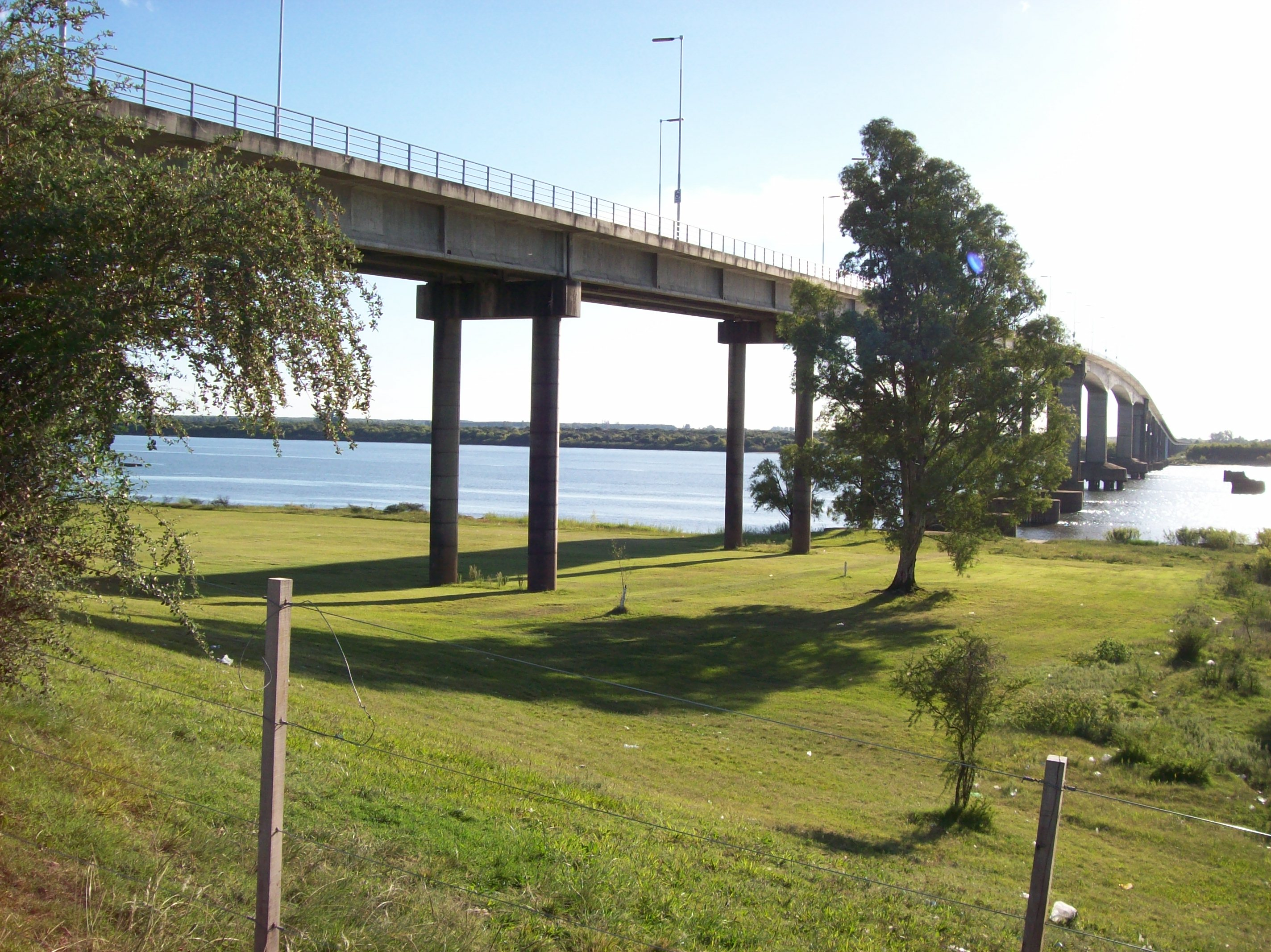 Puente General Artigas sobre el Río Uruguay, desde territorio uruguayo.